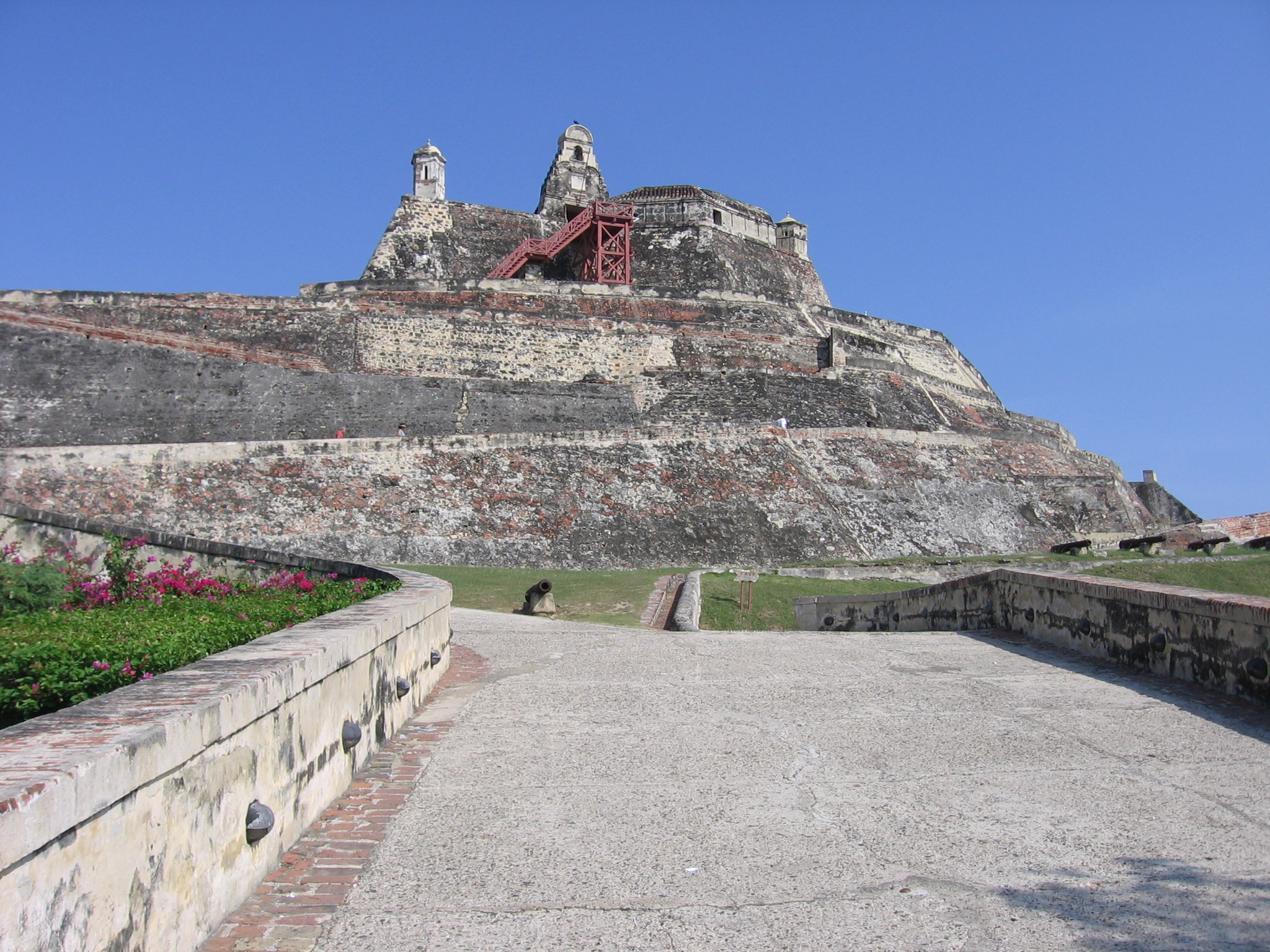 Castillo San Felipe